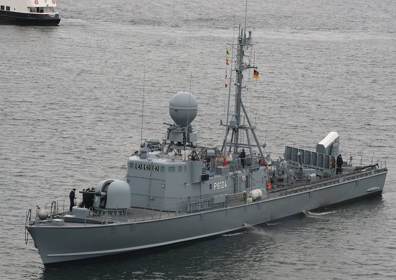 Schnellboot der Deutschen Marine (GEPARD-Klasse, S74 Nerz, gehÃ¶rt zum 7. Schnellbootgeschwader, stationiert in WarnemÃ¼nde), LIZENZFREI, fotografiert und freigegeben von Alexander Blum (